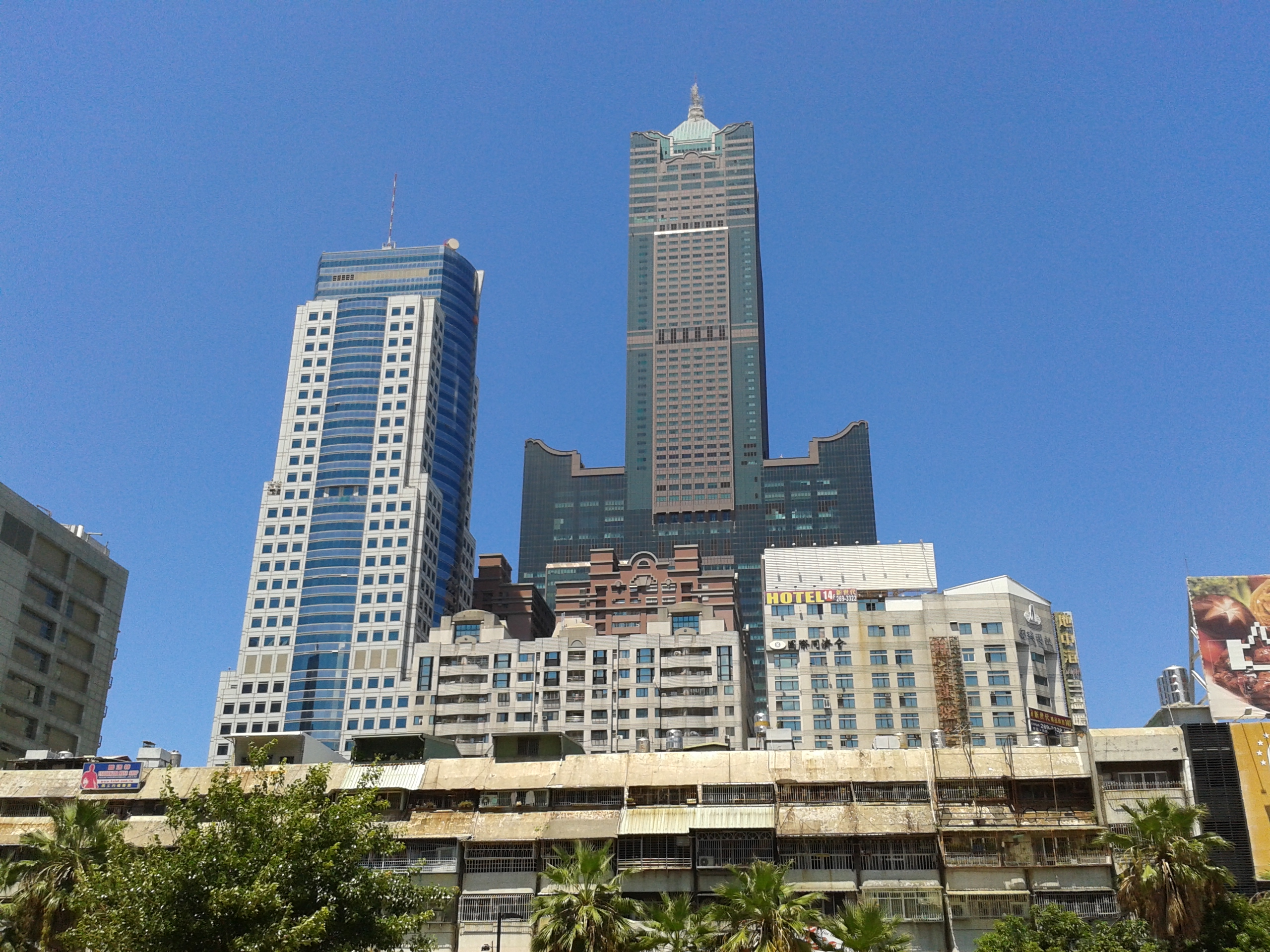 亞太財經廣場、高雄85大樓。